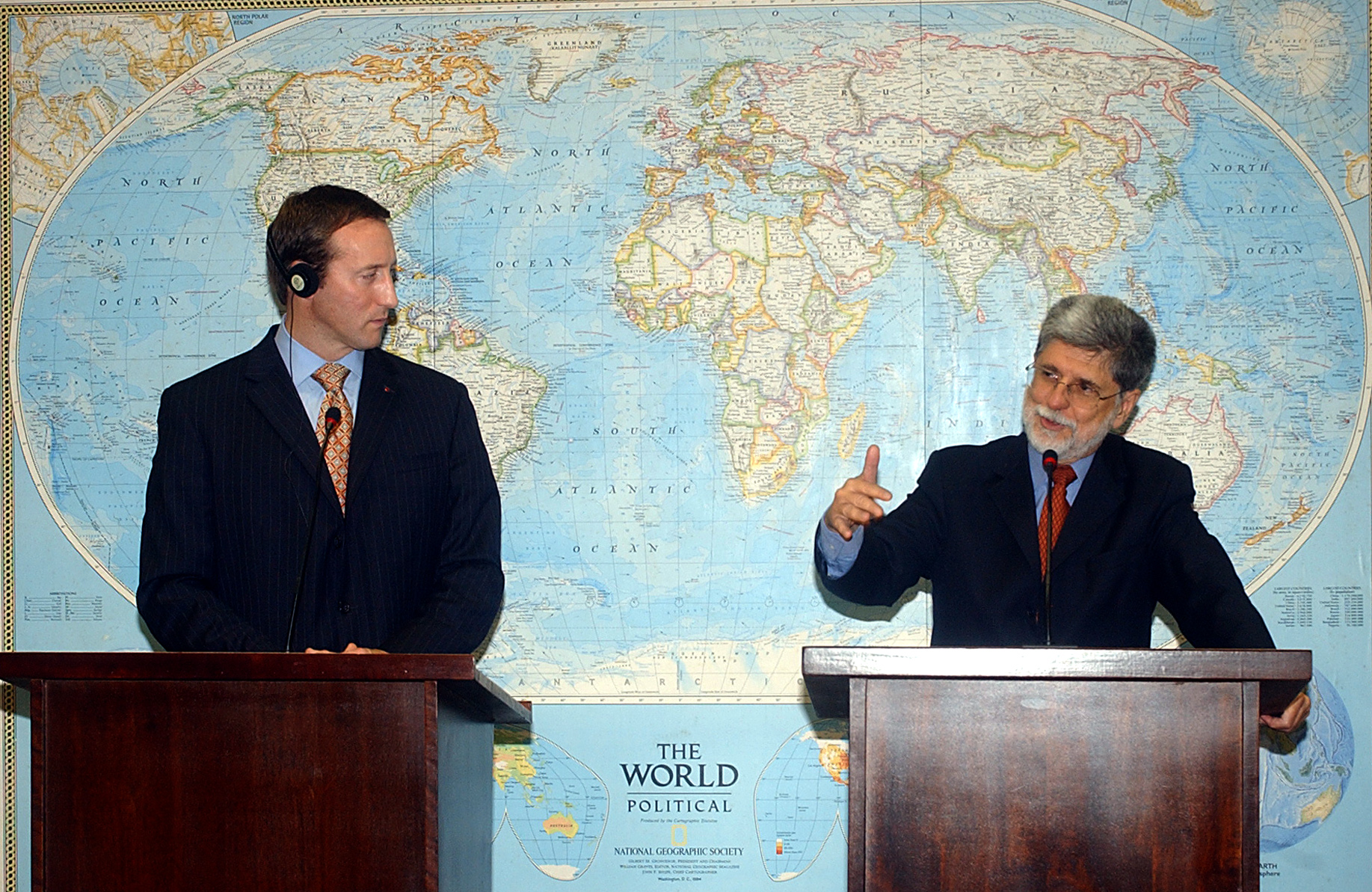 O ministro das Negócios Estrangeiros do Canadá, Peter MacKay (à esquerda), e o análogo brasileiro Celso Amorim em Brasília.